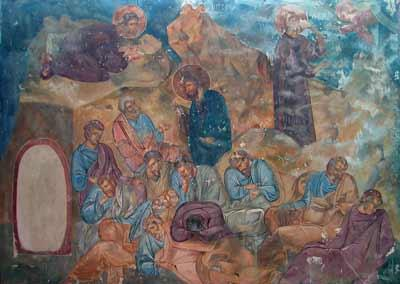 МОЛИТВА НА МАСЛИНОВАТА ГОРА ,црква Св. Андреа, р.Треска, 1389 год., темпера на платно, шир. 227 см., вис. 174 см.